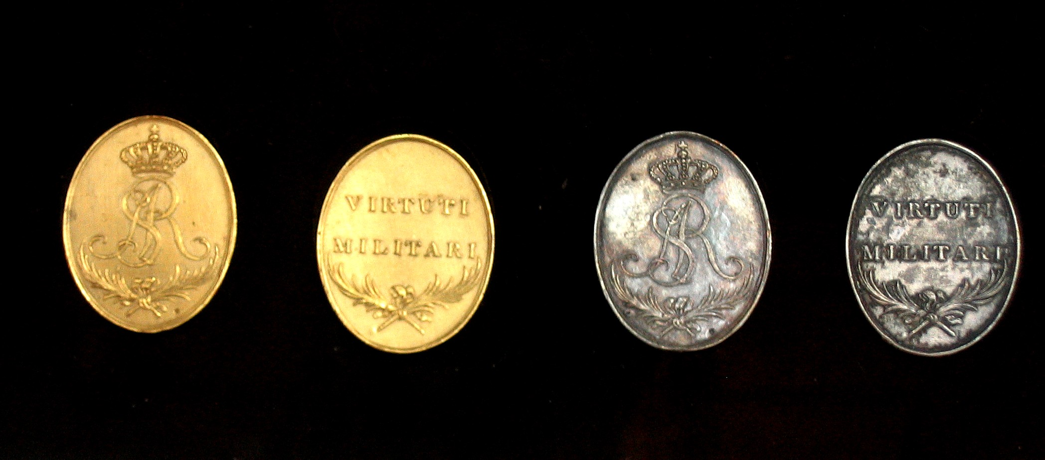 Polish Medal Virtuti Militari 1792 author User:Mathiasrex Maciej Szczepańczyk